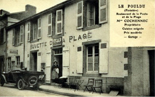 Postal promocional del Restaurant de la Poste et de la Plage, Le Pouldu (Finistère), propietat de la Sra. Cochennec. Abans era la Buvette de la Plage portada per Marie Henry.